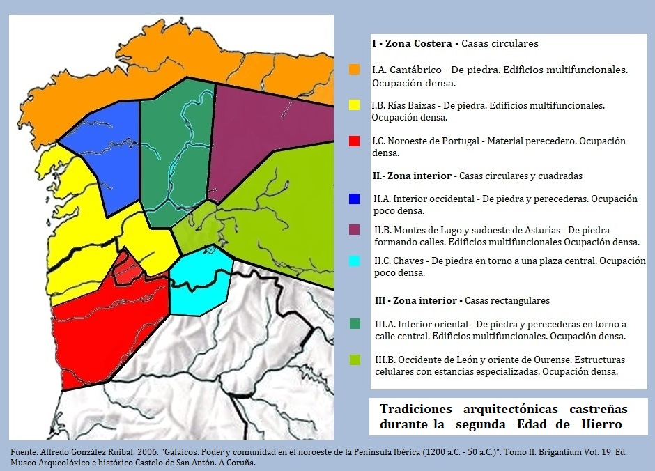 tipologías de la arquitectura castreña durante la segunda Edad de Hierro